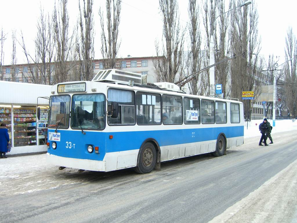 последние фотографии работы троллейбусов на левом берегу Воронежа в 2006 году